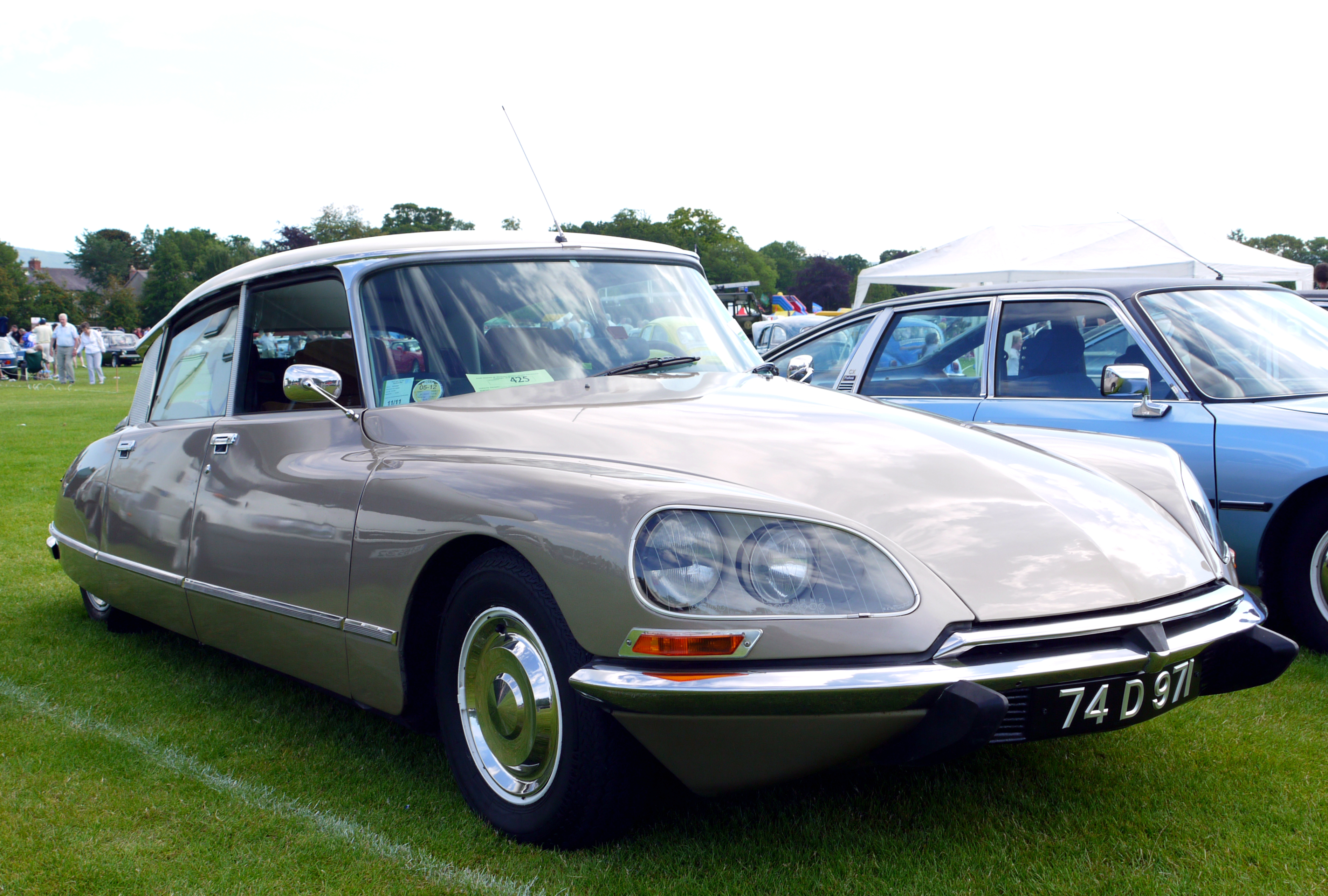 1974 Citroën DSuper 20.